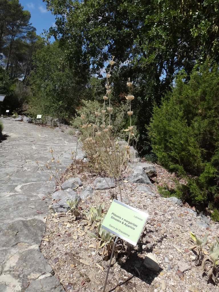 Jardín Botánico El Castillejo, El Bosque (Andalucía, España)